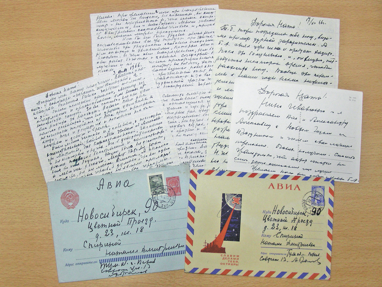 Письма Б. Н. Абрамова к Н. Д. Спириной